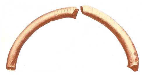 Colanul cu inscriptie de la Pietroasa